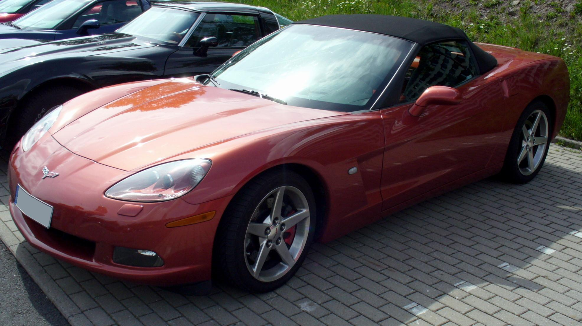 Corvette C6 Convertible